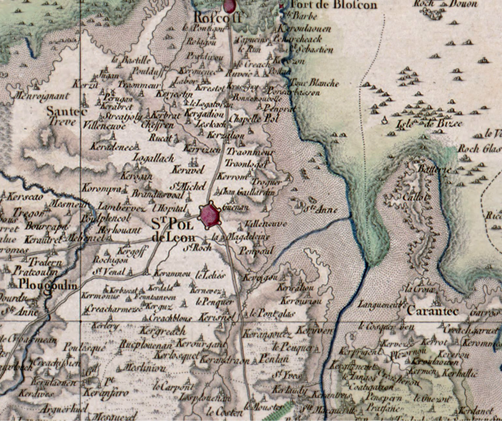 Saint-Pol-de-Léon sur la carte n° 170 de Cassini. Relevés de 1782 et publications vers 1783 ou de 1789 à 1815.